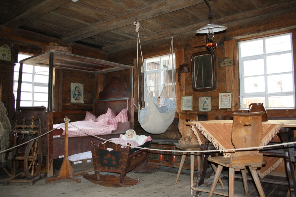 Blick in die Blockstube des Wohnstallhauses Johann Georg Wunderlich mit Einrichtung aus der Zeit der Museumsgründung